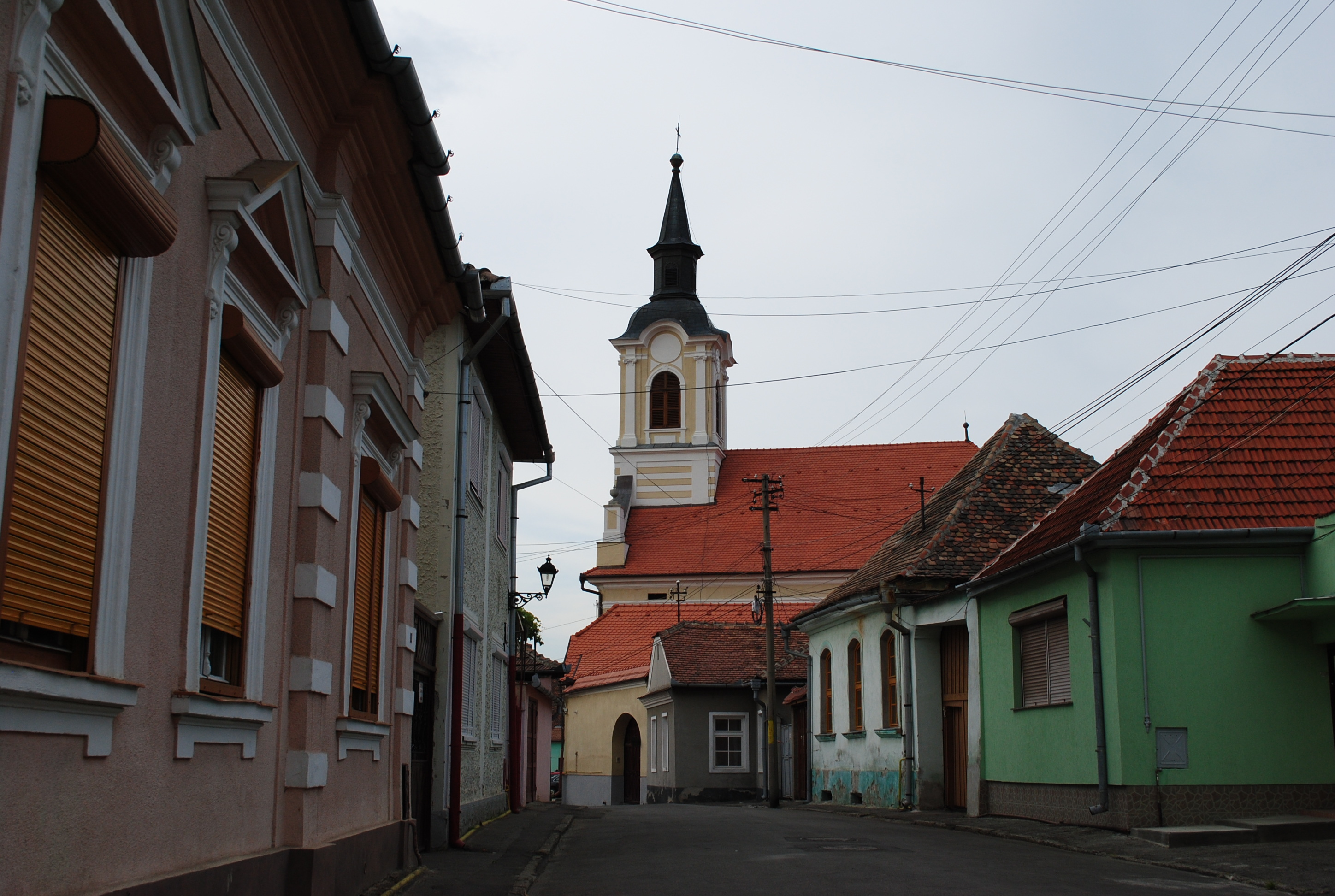 Biserica "Înălțarea Domnului" 1826